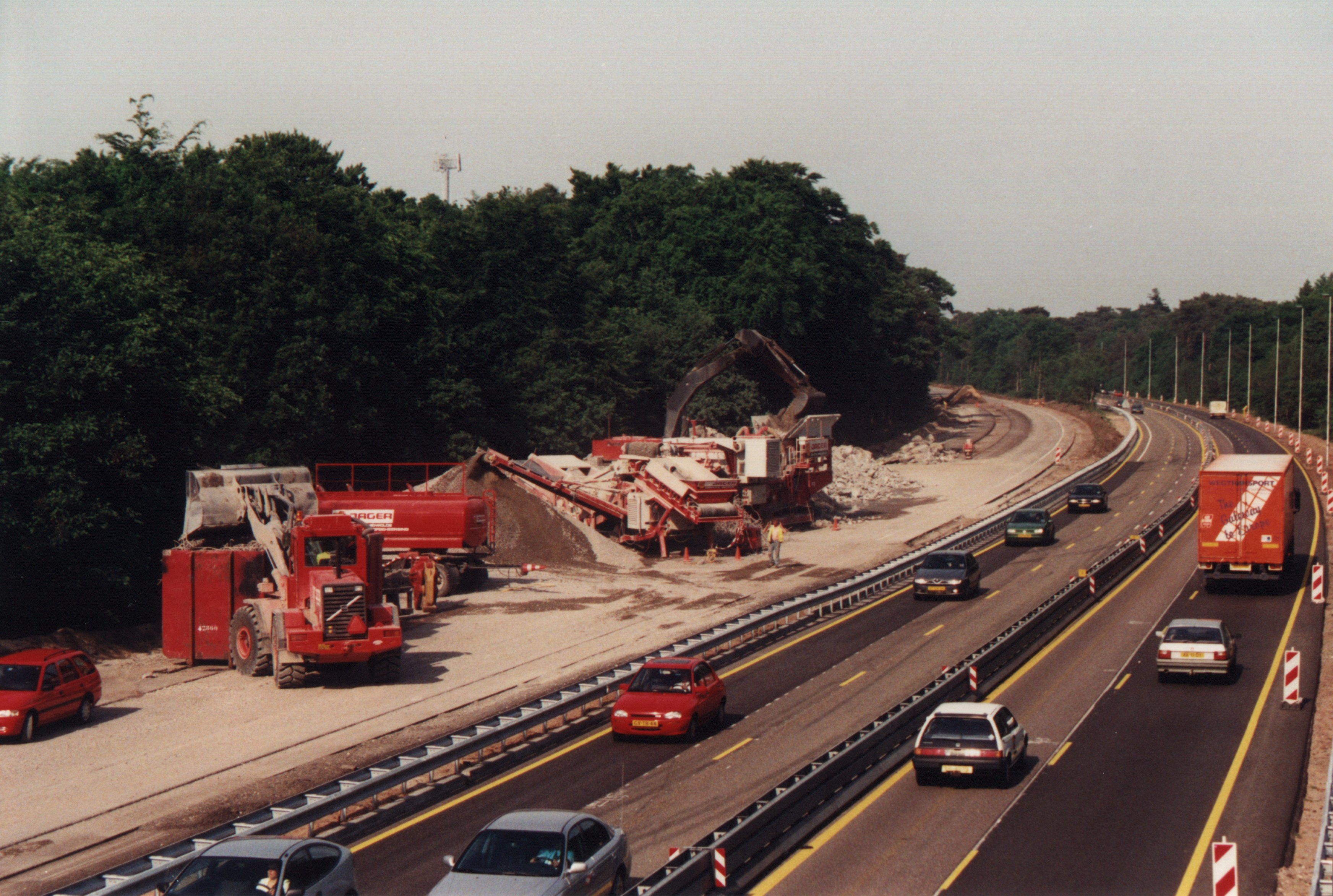 Mobiele puinbreker tussen Harderwijk en Nunspeet